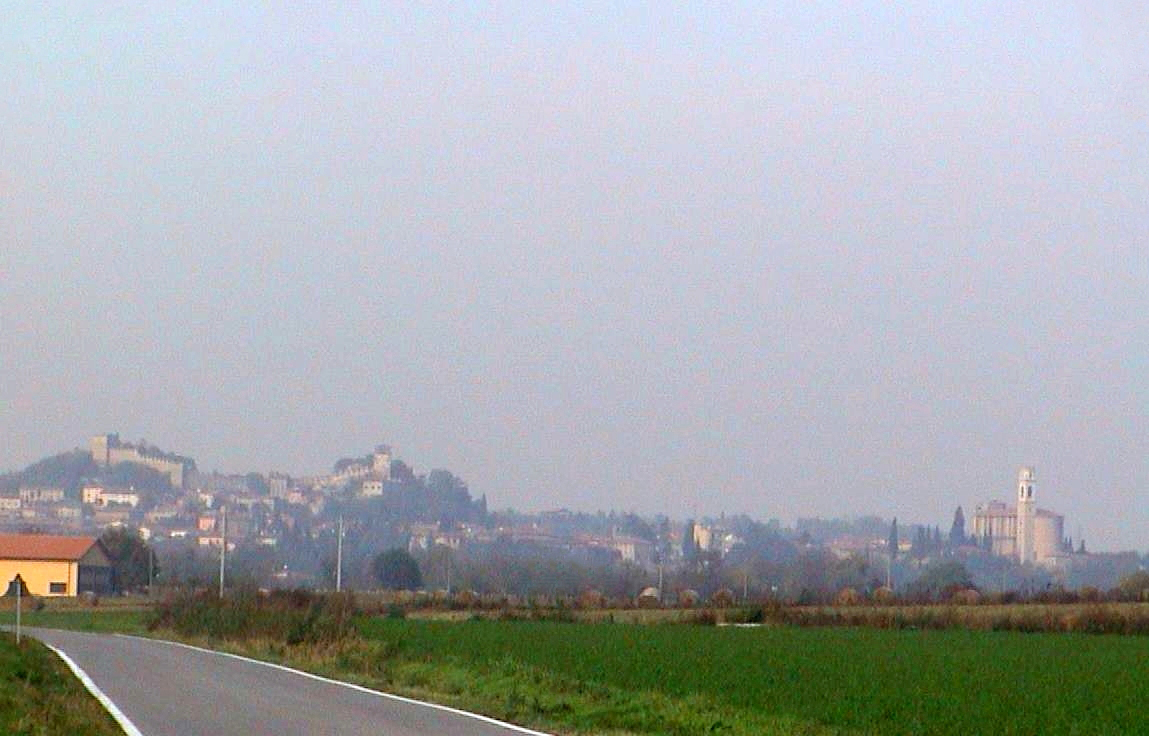 Monzambano panorama da sud, lavoro personale, 2005, Pietro Liberati